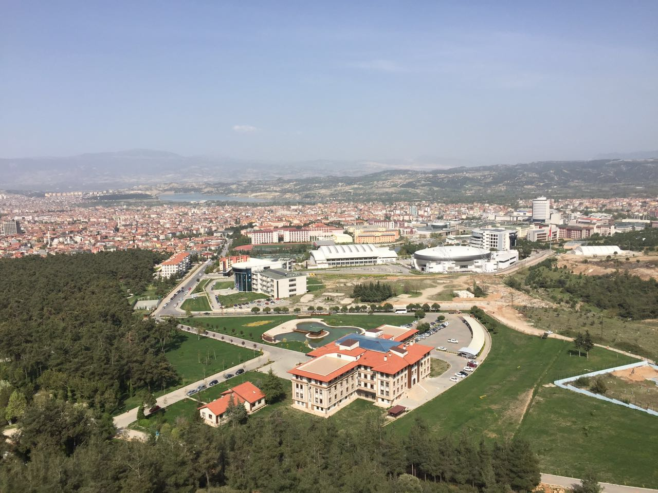 Denizli manzara fotoğrafı